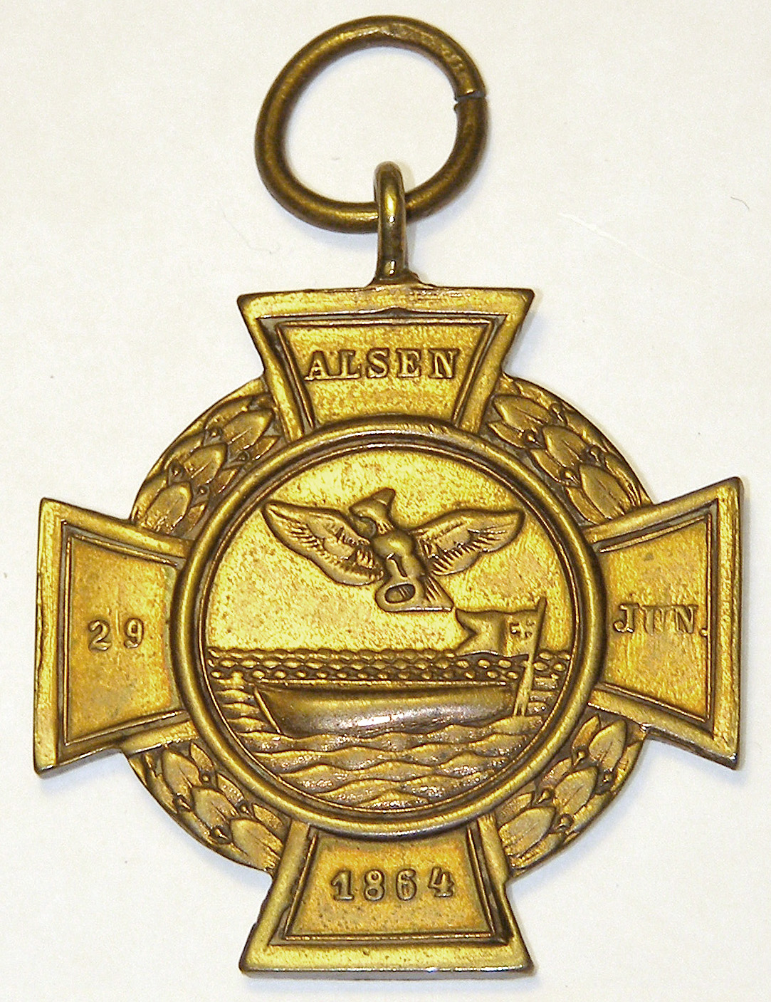 Alsenkreuz 1864